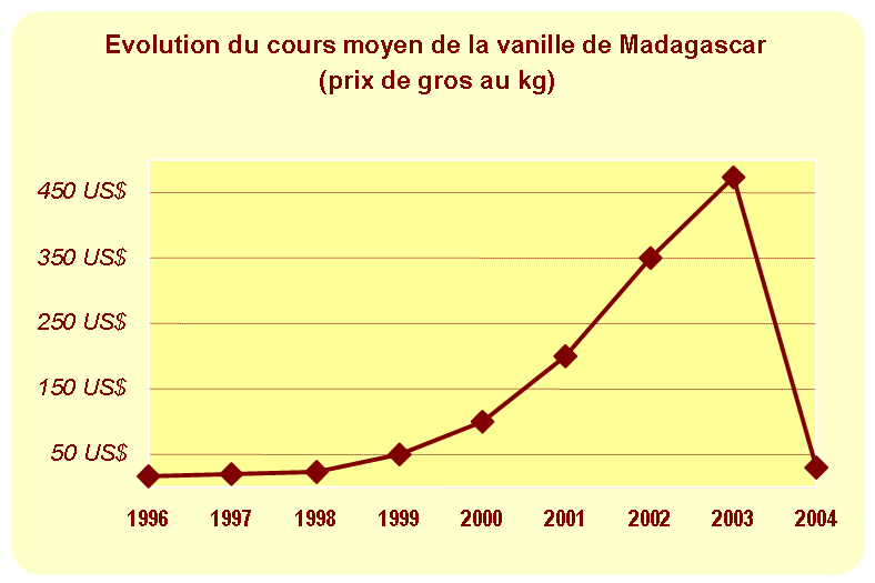 Vanilla of Madagascar sales prices source of data : Ministère de l'agriculture malgache